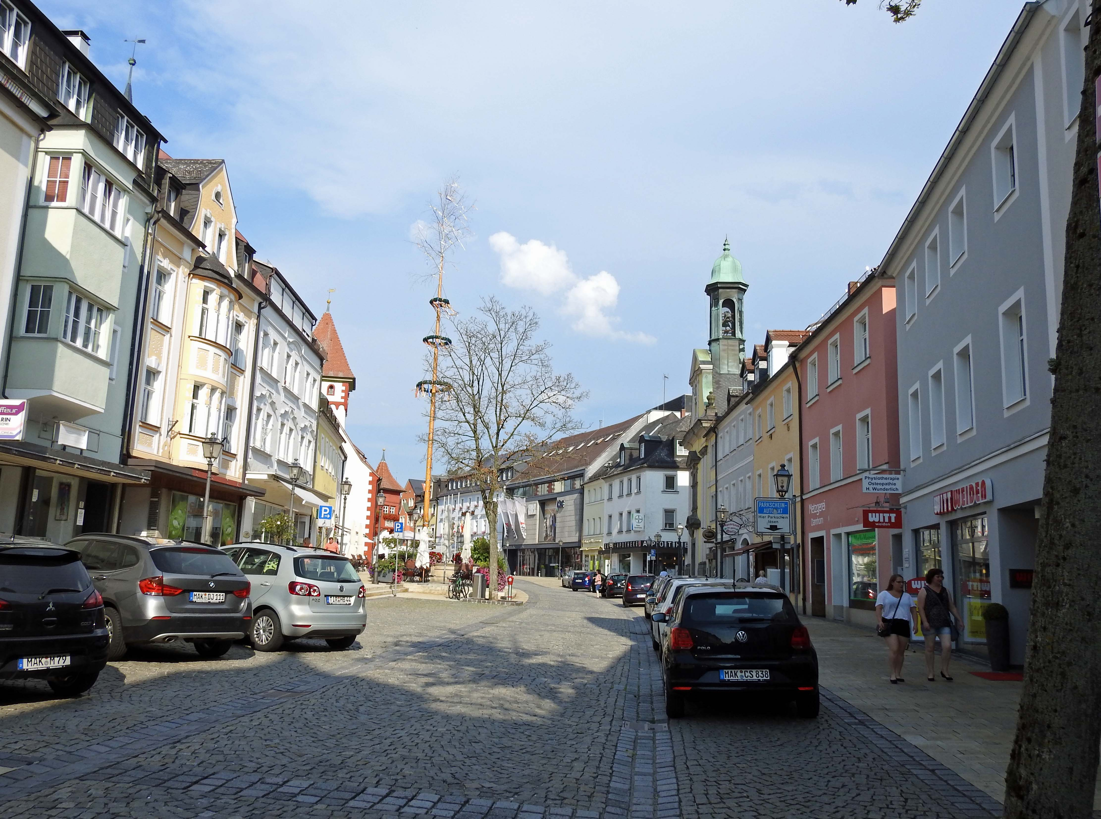 Ensemble Markt in Marktredwitz